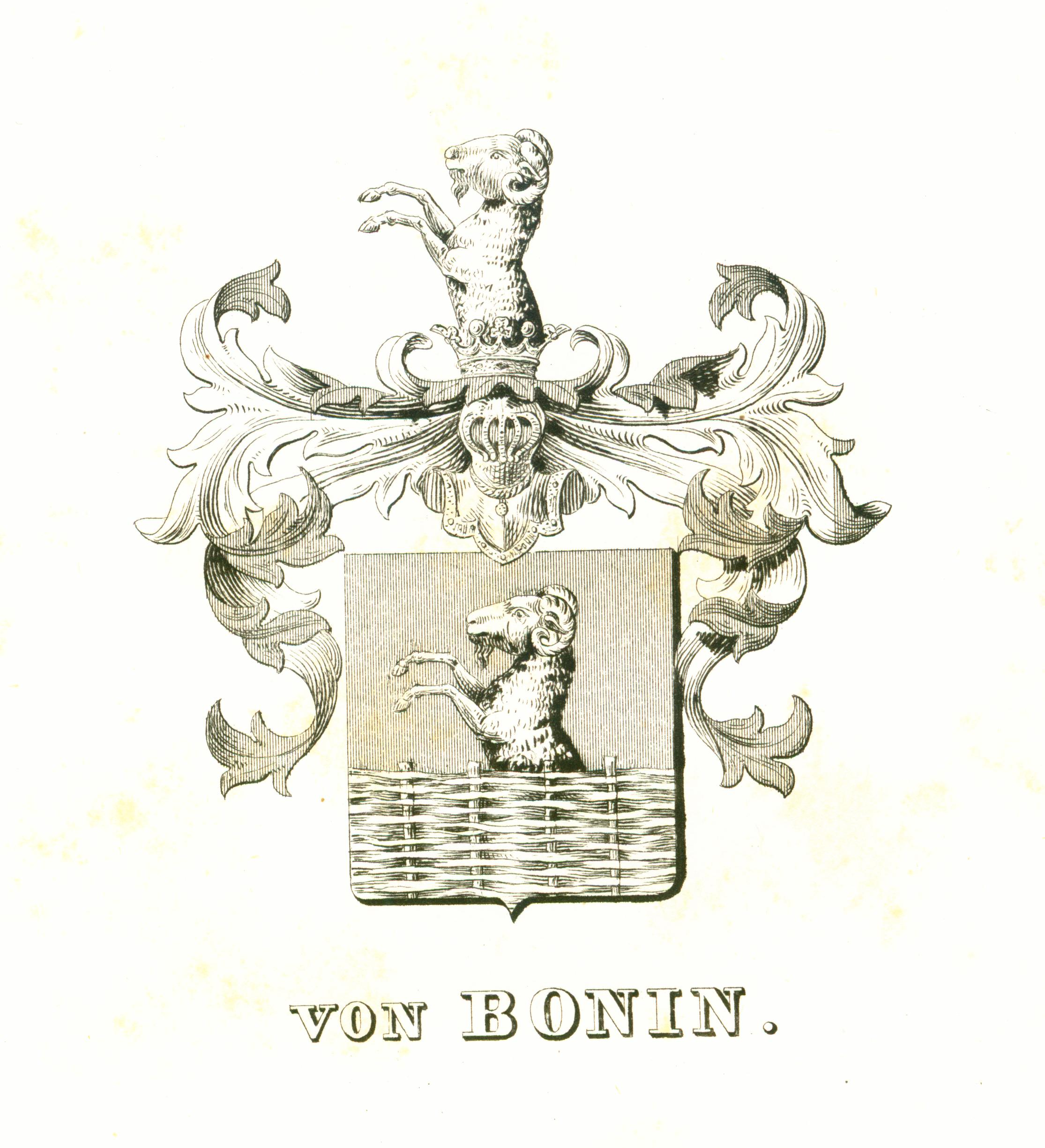 Wappen von Bonin